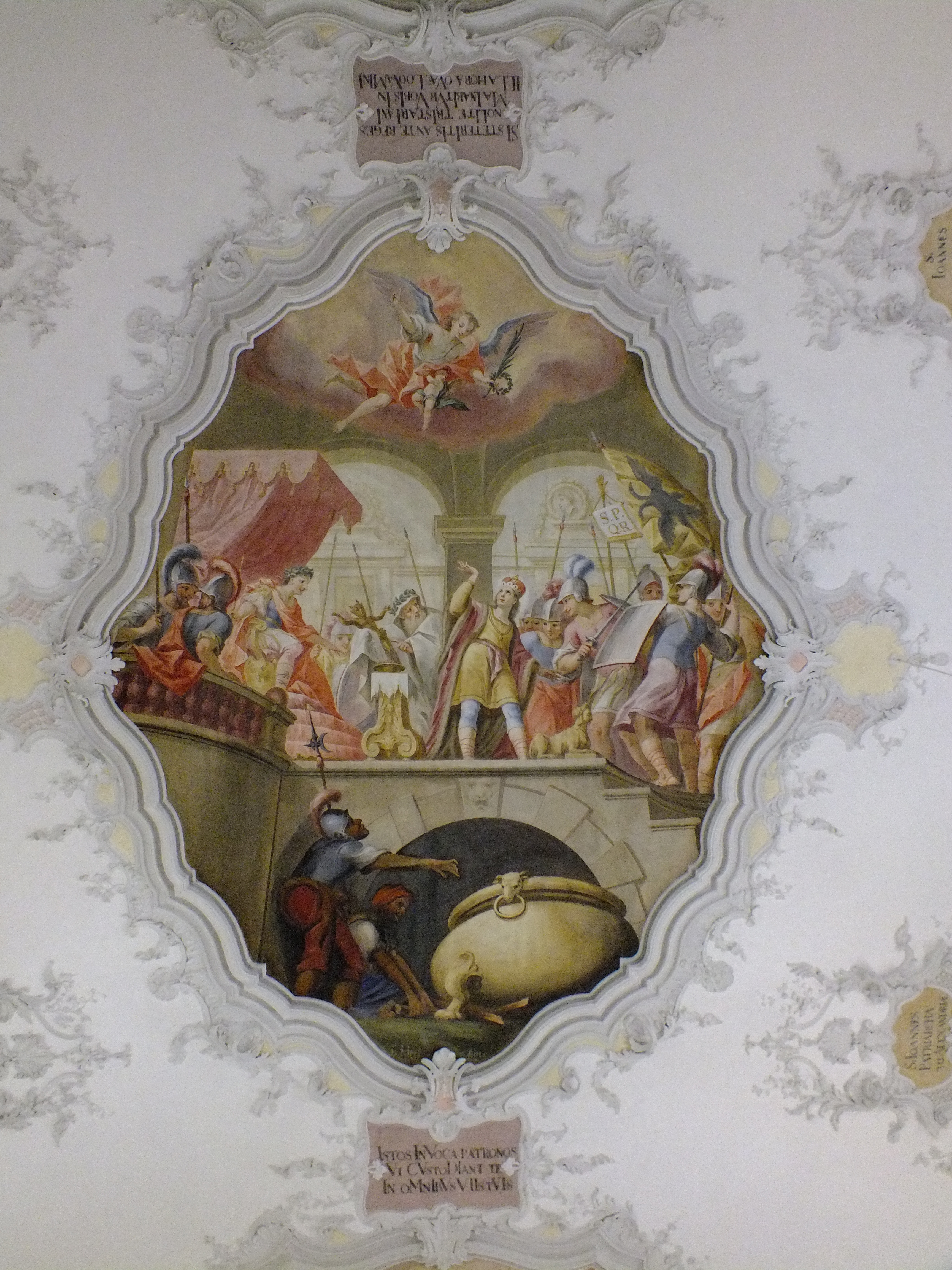 St. Vitus im oberschwäbischen Mauerstetten in Bayerisch/Schwaben